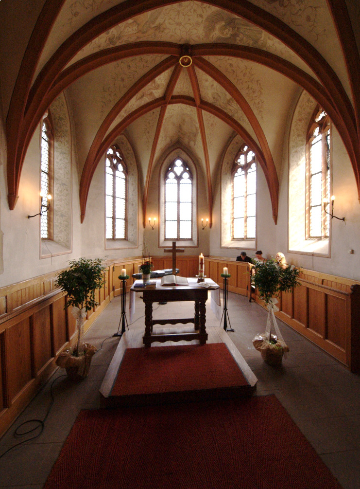 Chor der Zweikirche zu Rutsweiler an der Lauter. Quelle: Marco Creutz